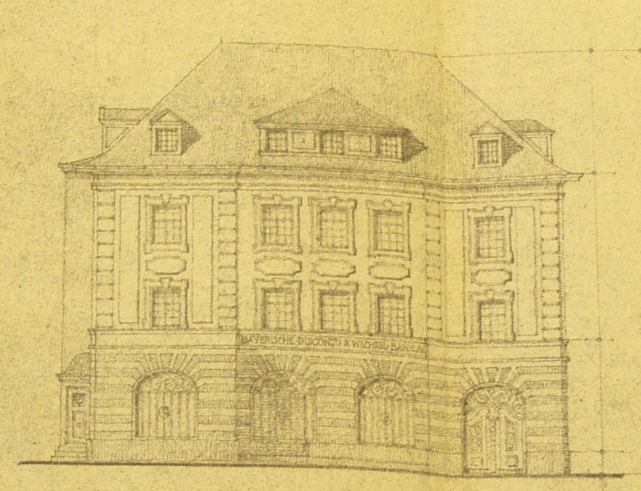 Fassadenplan des Künstlerhauses Kempten